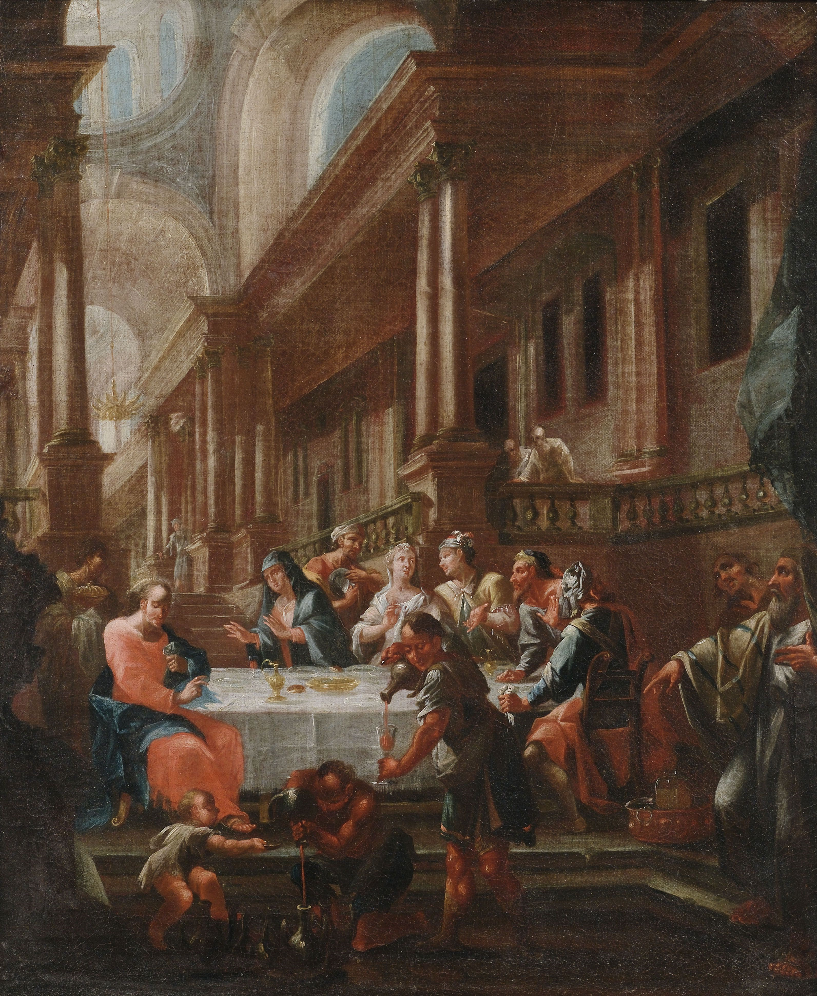 Die Hochzeit zu Kana